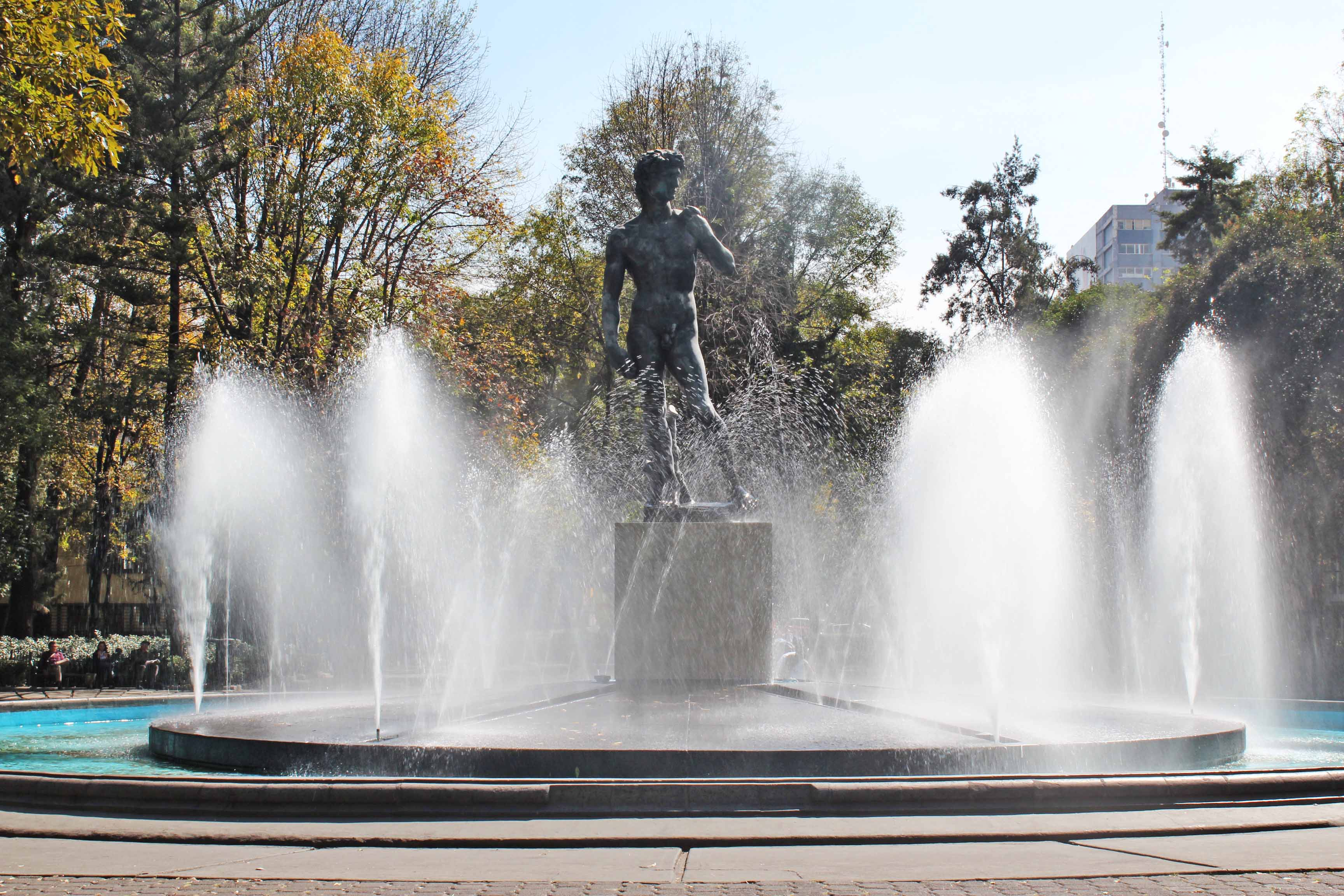 Réplica del David de Miguel Ángel en la Plaza Río de Janeiro de la Colonia Roma, Ciudad de México. Donación GLAM Universidad de la Comunicación.